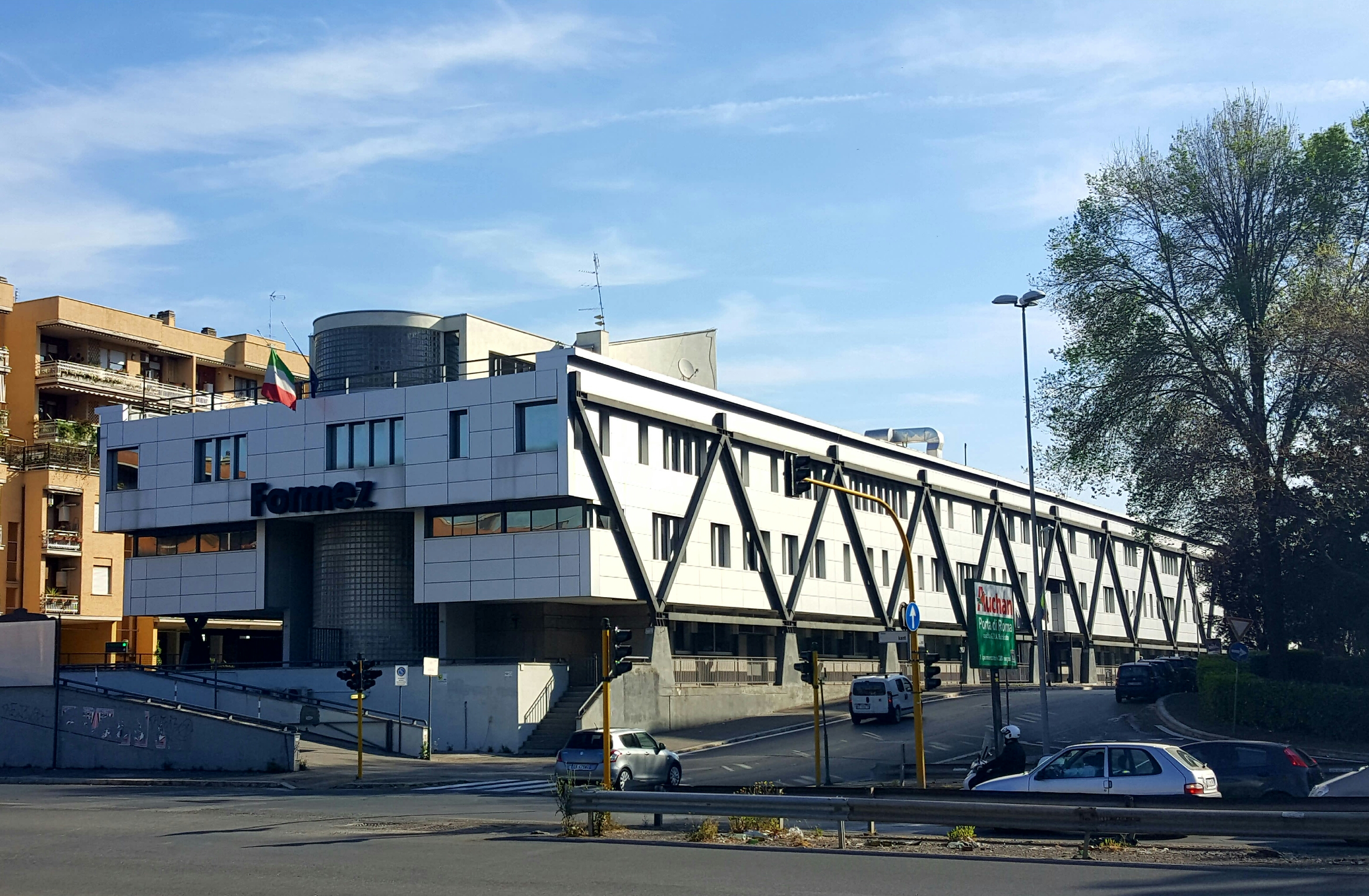 Sede Formez a Roma a Viale Marx, 15.